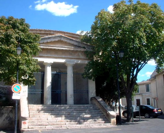 Temple: Beauvoisin near Vauvert, in France